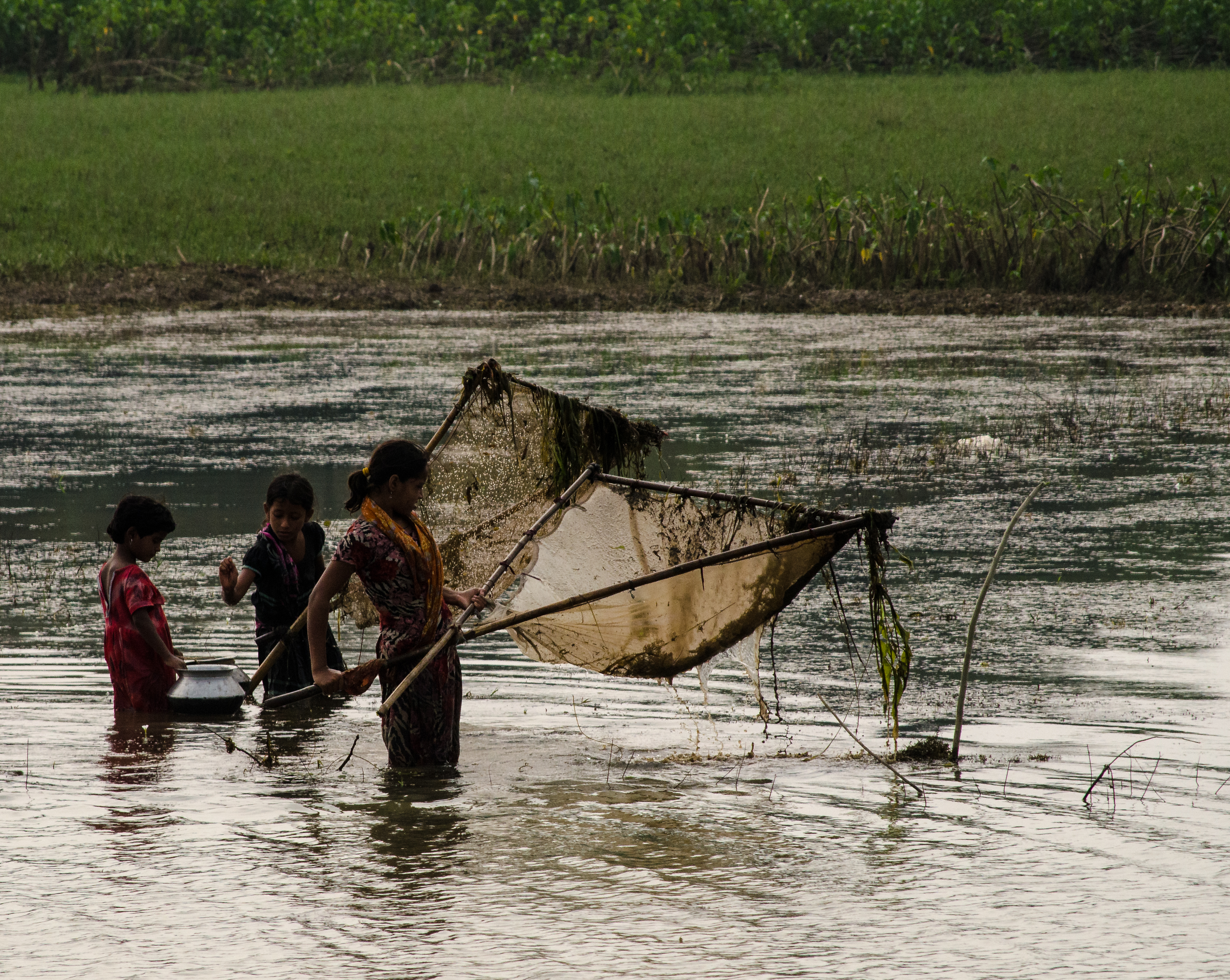 সুনামগঞ্জ জেলার টাঙ্গুয়ার হাওড়